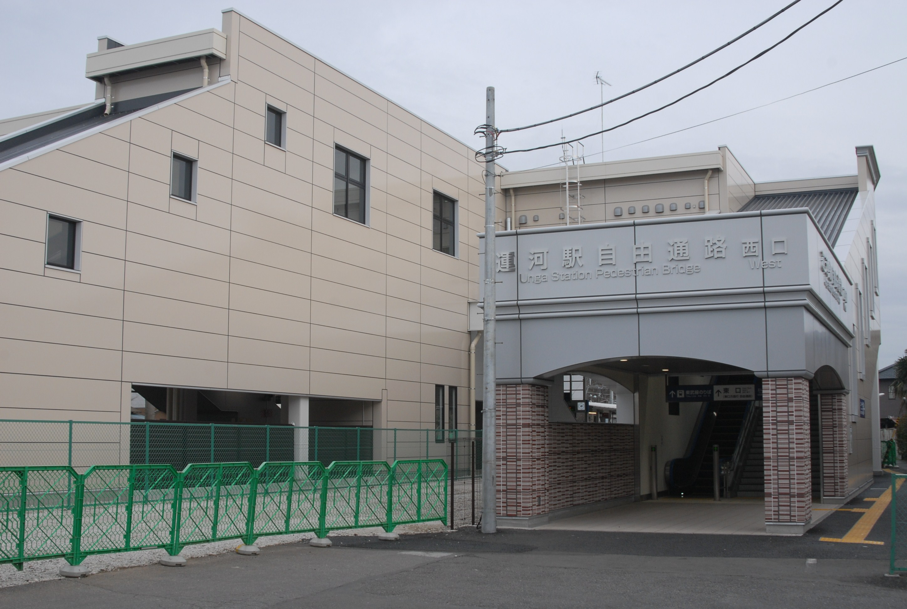 運河駅自由通路西口。2013年7月13日より使用開始。